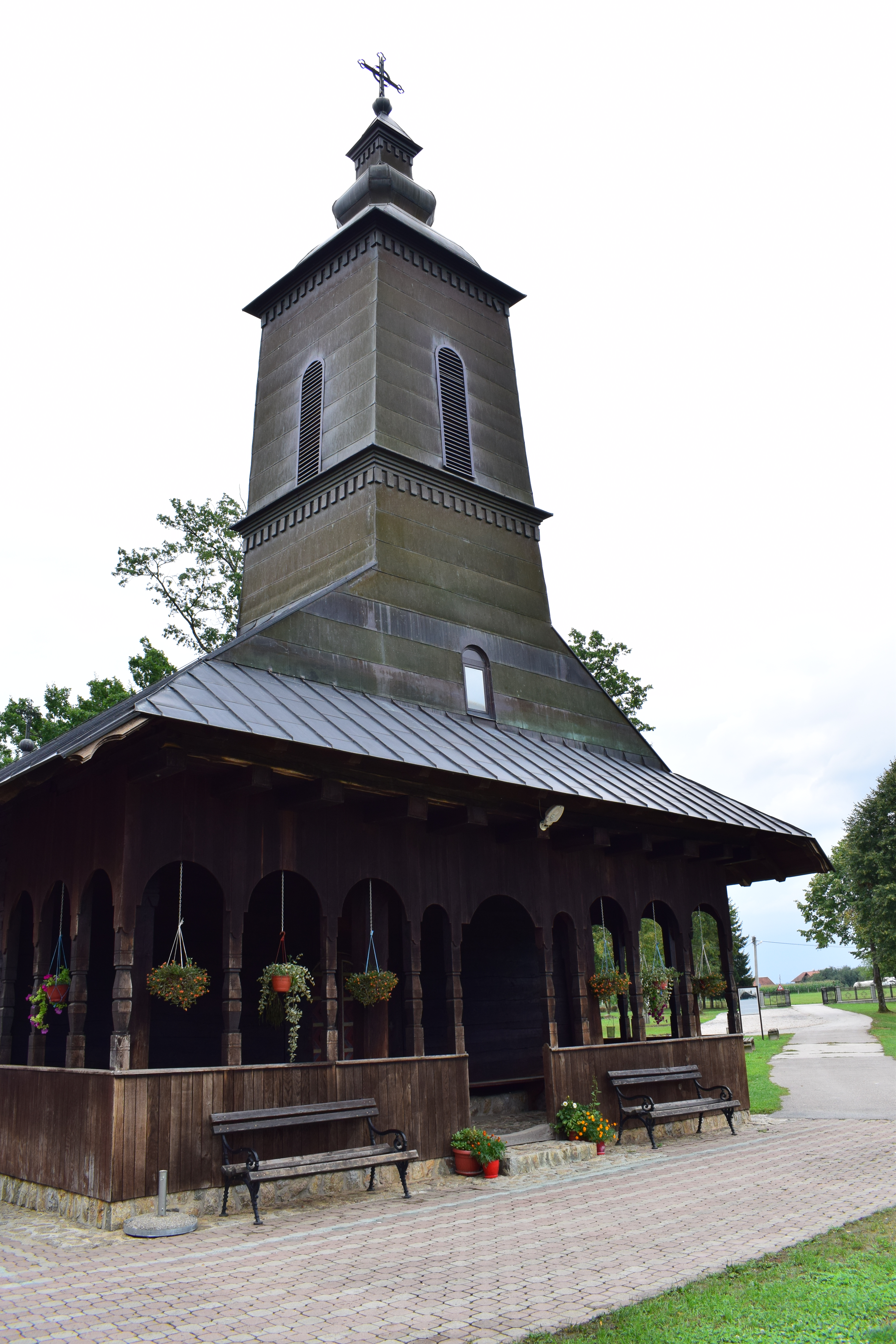 Црква брвнара у Марићкој је посвећена Светом пророку Илији и налази се око 20-ак km од Приједора. На основу урезаног натписа изнад западних врата, гдје се помиње 1870. година, није јасно да ли је то година изградње цркве или неке од њених обнова. На тавану ове цркве нађене су царске двери, на којима је урезан датум 30. јули 1753. године, који би се могао односити на цркву која је на истом мјесту била прије ове цркве брвнаре. Цркву је радио Теодор Чанак. Велика санација цркве вршена је 1938. године. Олтарски простор остао је исти од 1938. године и рађен је по угледу на олтарске преграде у руским црквама, а иконе на иконостасу је урадио руски сликар Павле Житецки. Црква брвнара у Марићкој припада парохији Марићка и обухвата подручје Доње, Средње и Горње Марићке, те Кривају. За Илиндан код цркве се одржава велики народни збор. У непосредној близини цркве налази се стари храст, за кога стручњаци сматрају да је стар око 600 година. Црква брвнара у Марићкој је у октобру 2010. године проглашена националним сомеником.